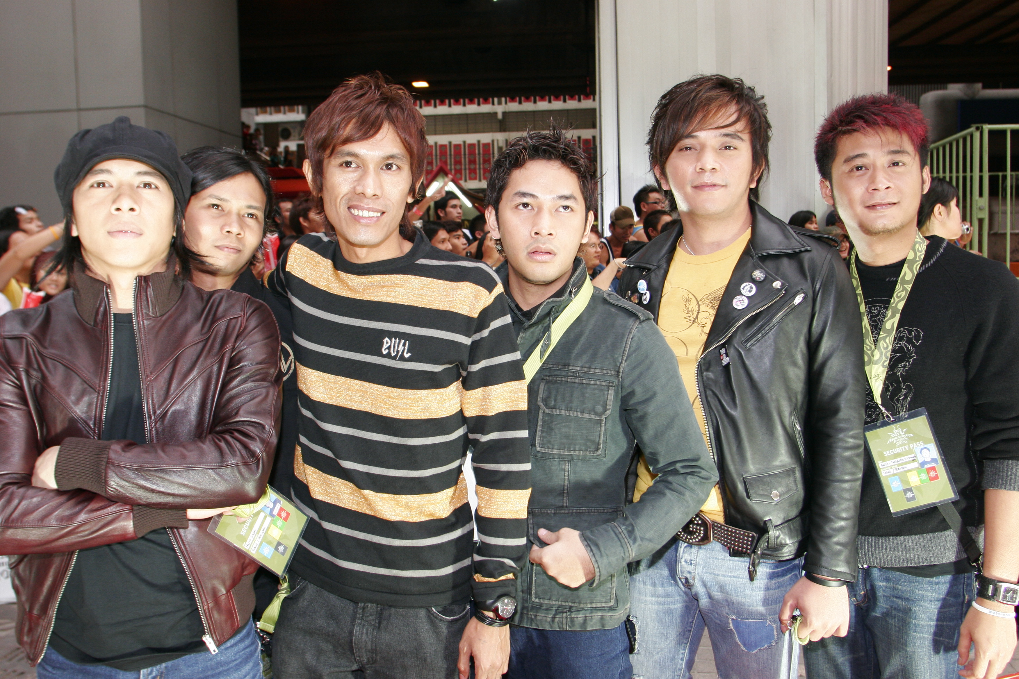 Peterpan (Indonesian Band) at Bangkok,Thailand